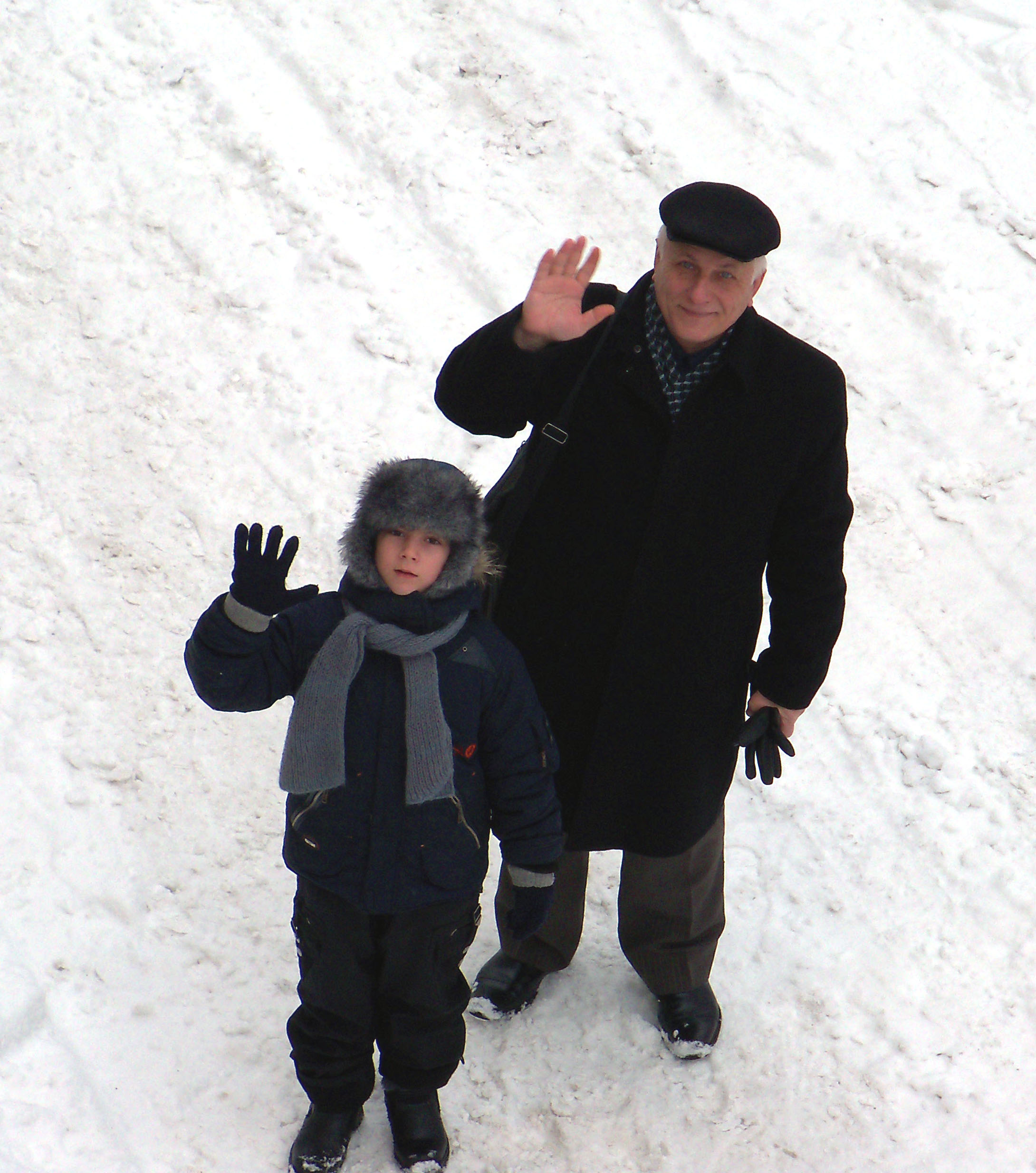 Внук і дід